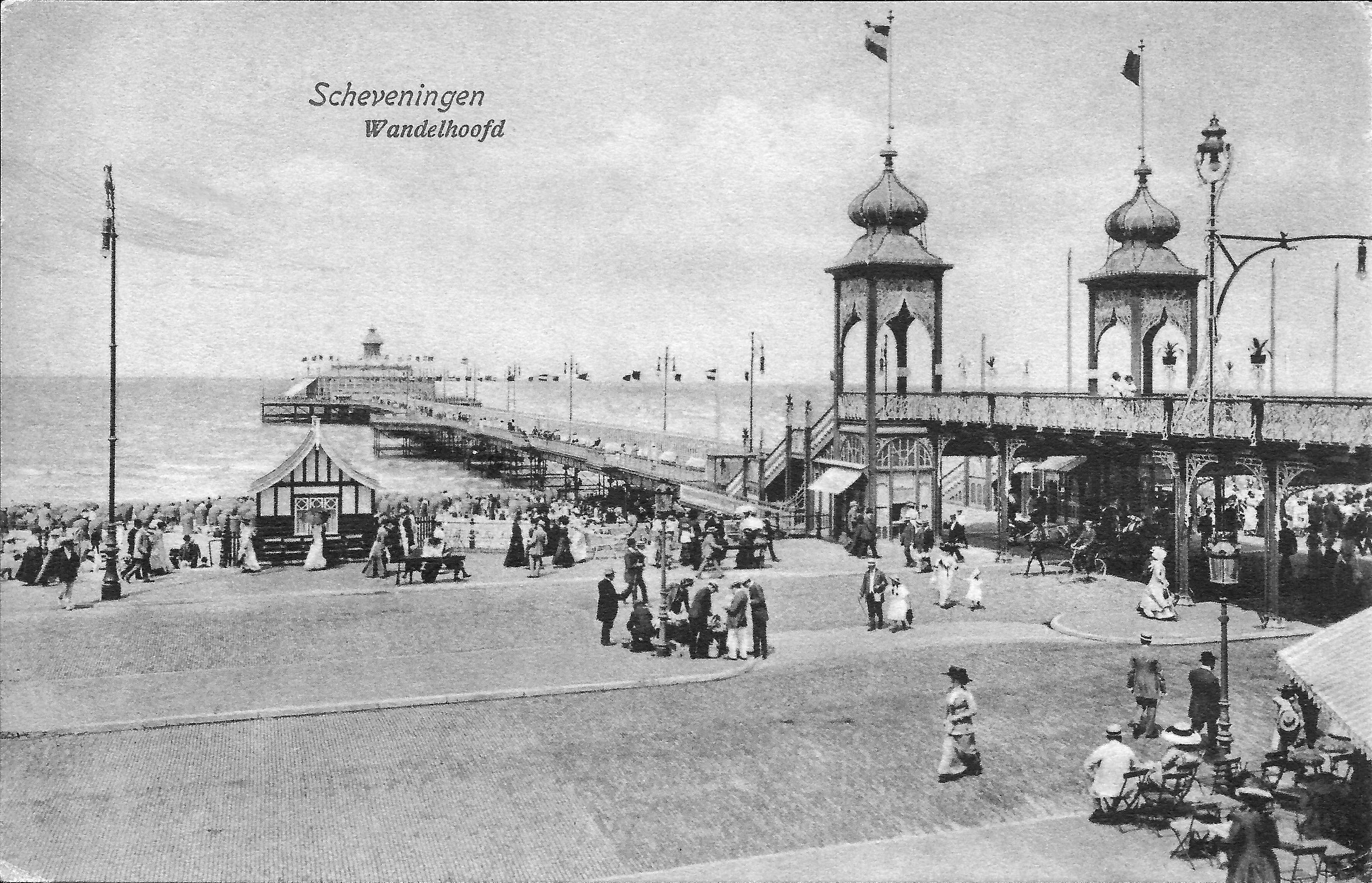 Oorpsronkelijk Scheveningse Wandelhoofd gebouwd in 1901